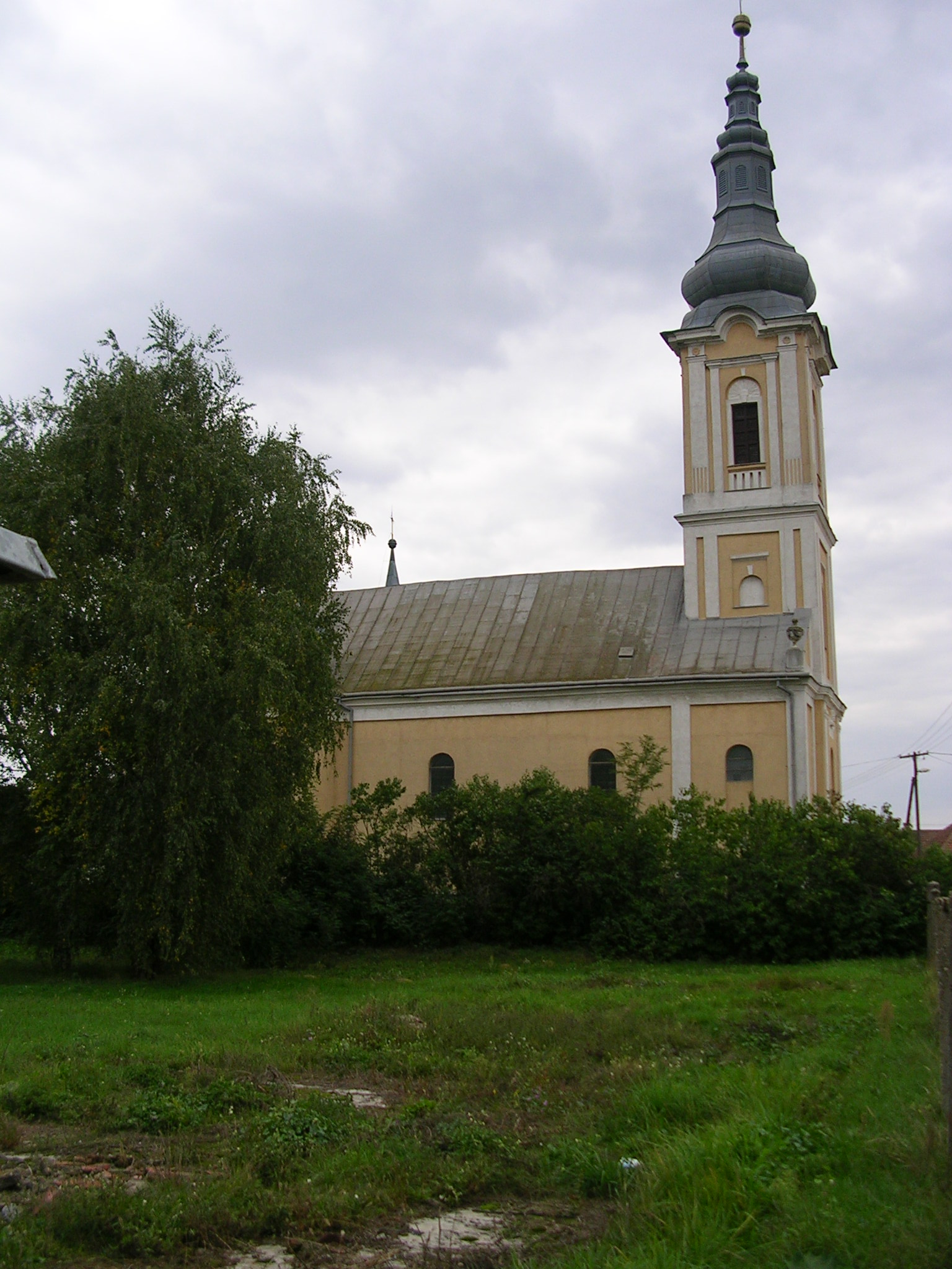 Fábiánháza Istenszülő születése Görög Katolikus templom